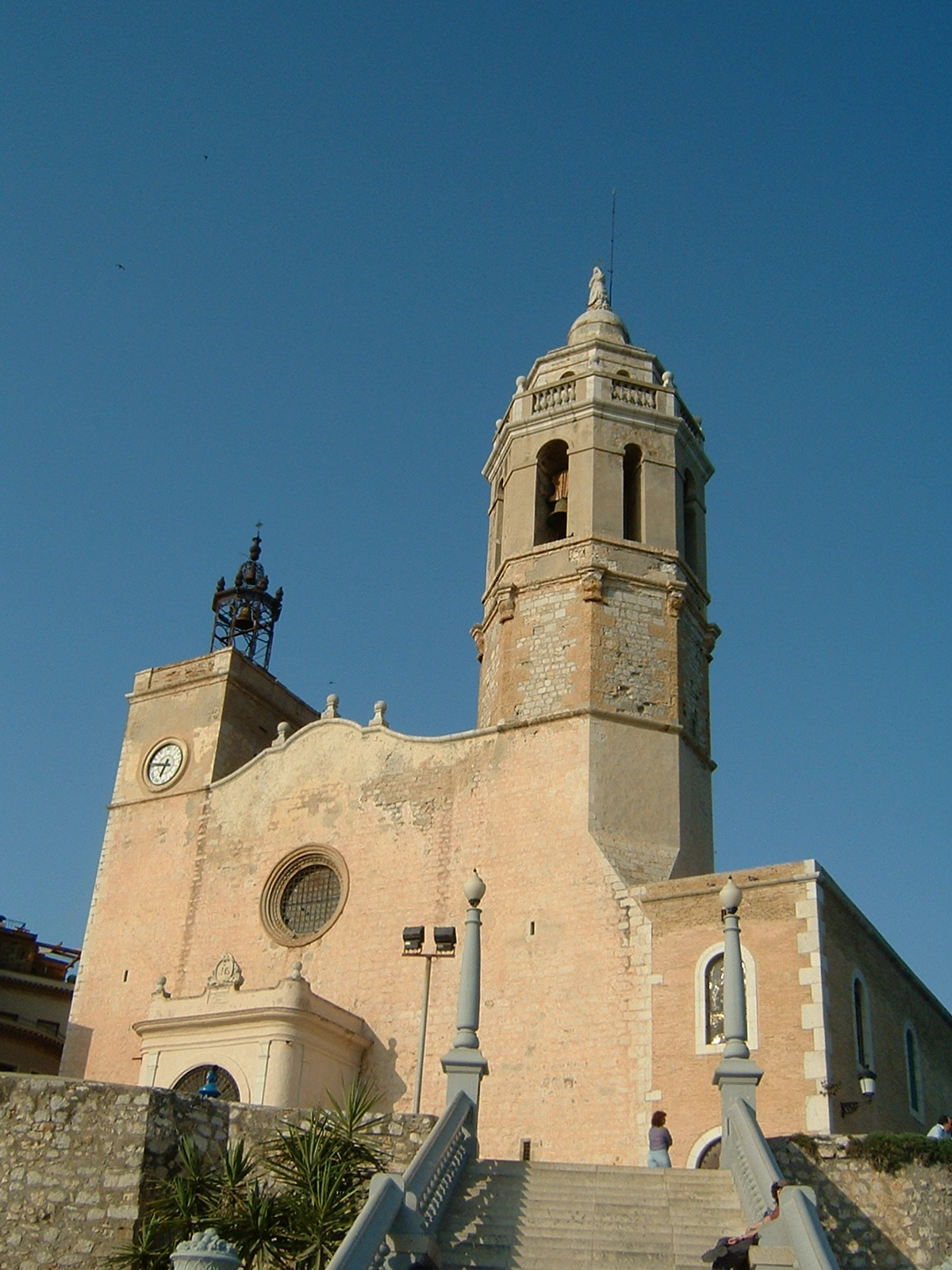 Sant Bartolmeu i Santa Tecla iglesia/church